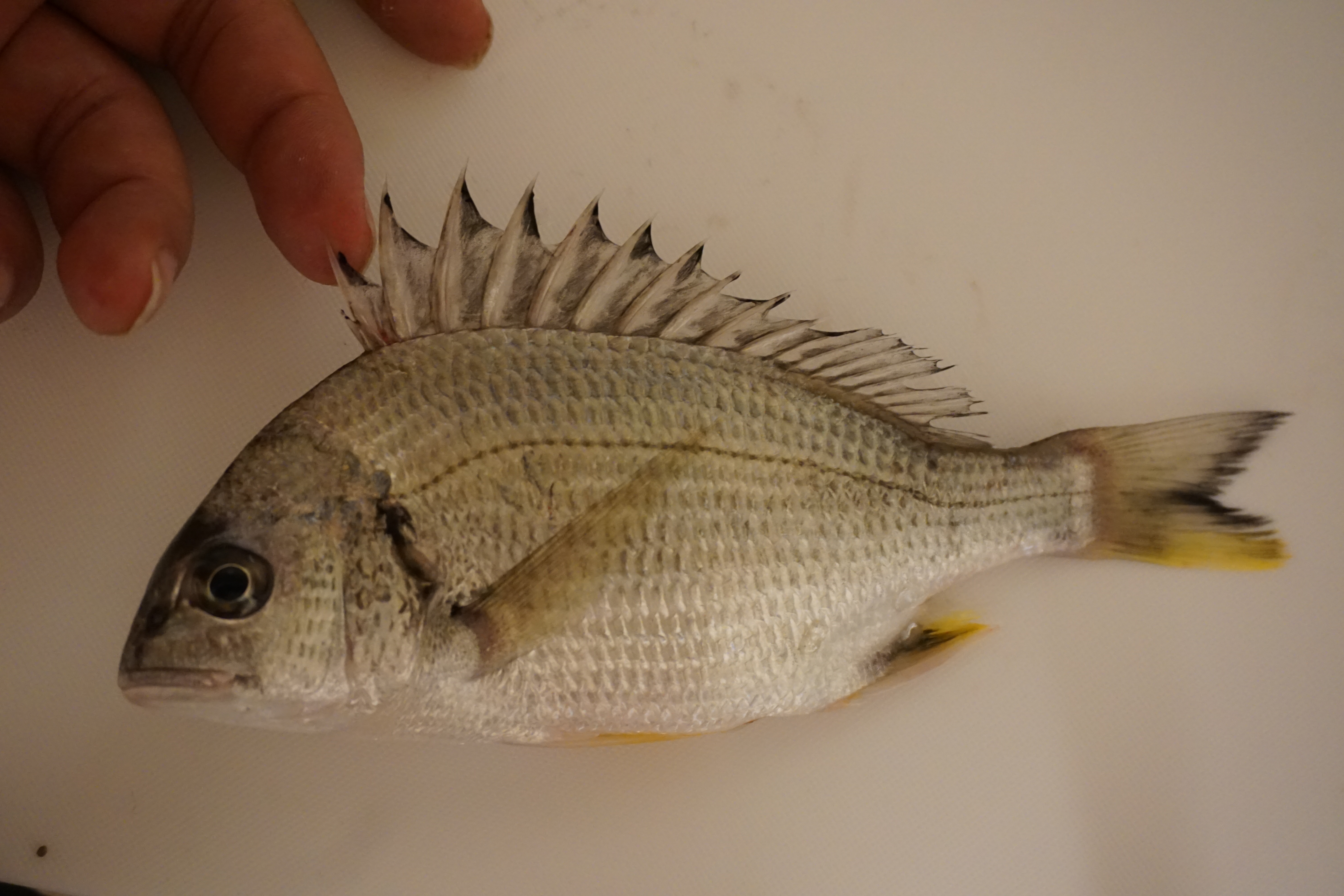 キチヌ（クロダイの近縁種）。尼崎海釣り公園にて採取